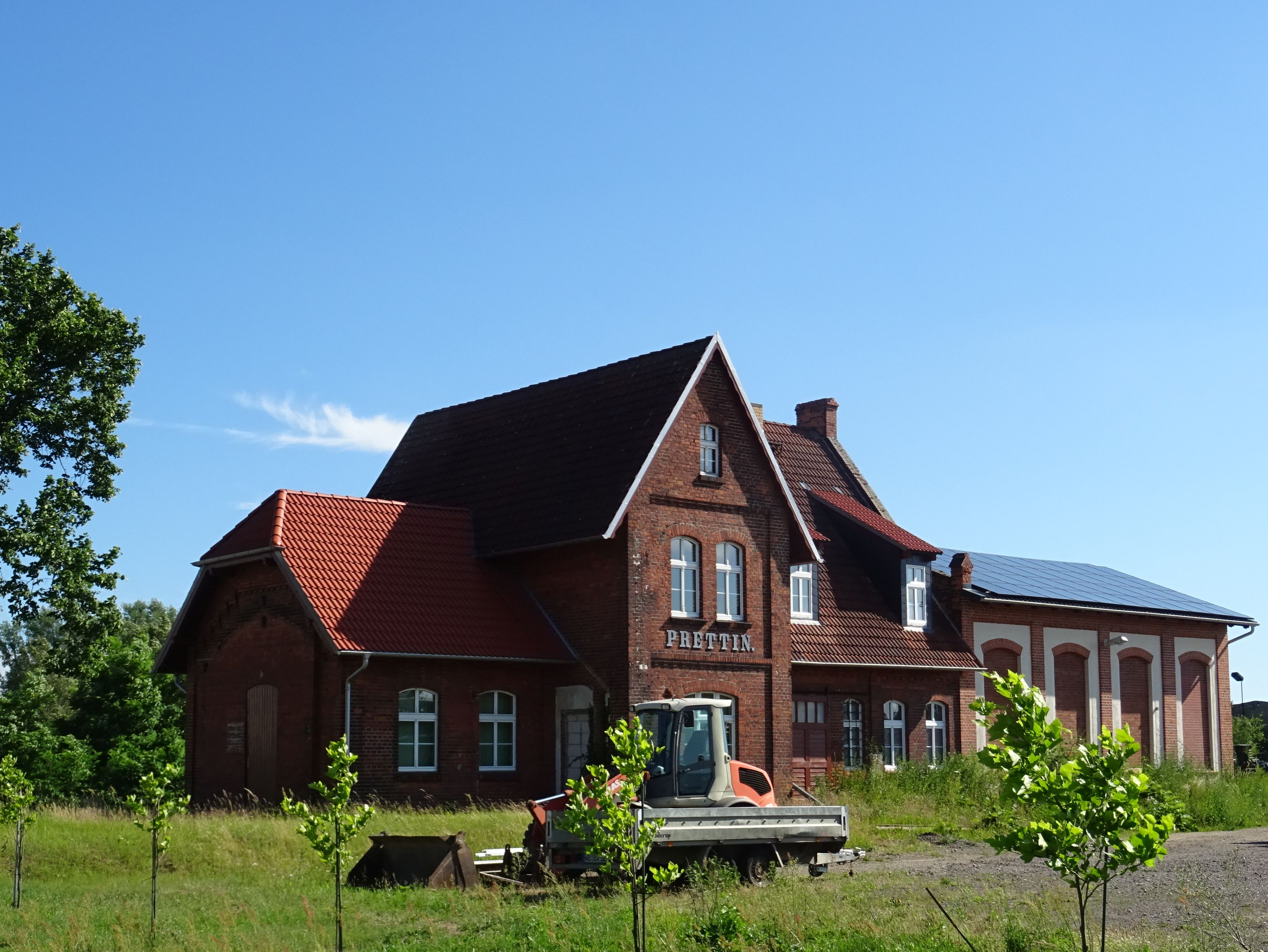 Bf. Prettin, Kulturdenkmal, Blick von Nordwesten